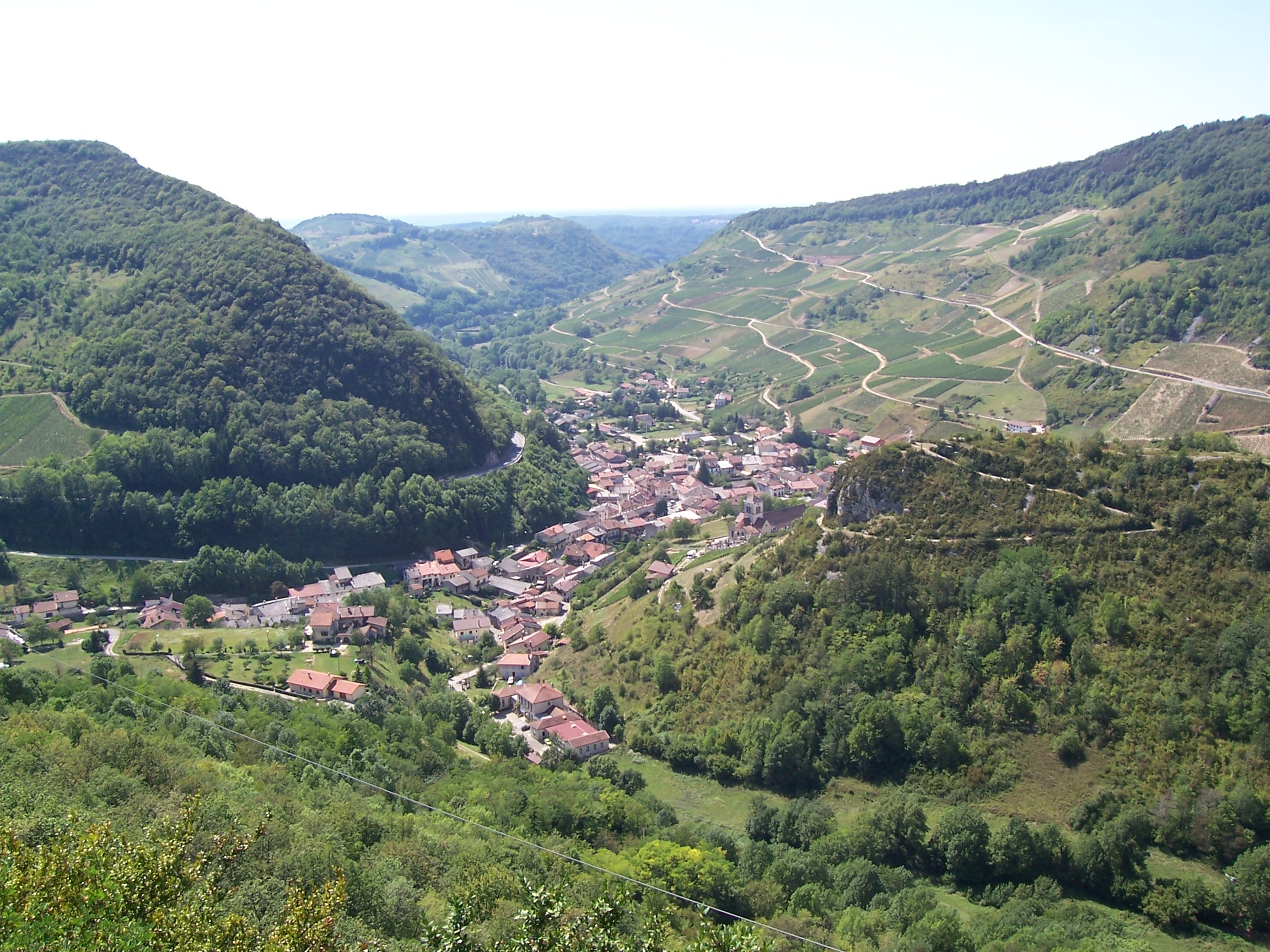 Le village de Cerdon dans l'Ain, France. Vue en hauteur, prise de la route nationale. On distingue (vers le bas) le câble de la tyrolienne. Publish by= User:Stephane8888 Self made